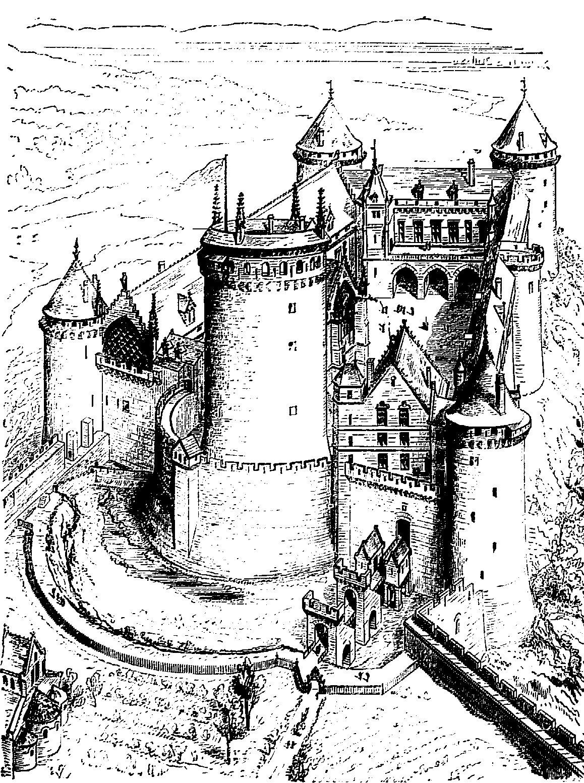 Dessin extrait de l'ouvrage Description du château de Coucy par Eugène Viollet le Duc. Le dessin est intitulé : Vue restaurée extérieure du Château de Coucy. Notice Gallica: Auteur(s) : Viollet-le-Duc, Eugène- Emmanuel (1814-1879) Titre(s) : Description du château de Coucy [Texte imprimé] / par M. Viollet-le-Duc,... Édition : 4e éd. Publication : Paris : Vve A. Morel, 1875 Description matérielle : 31 p. : ill. ; in-8 Note(s) : Les pl. sont comprises dans la pagination Sujet(s) : Coucy-le-Château-Auffrique (Aisne) -- Château Notice n° : FRBNF31590226